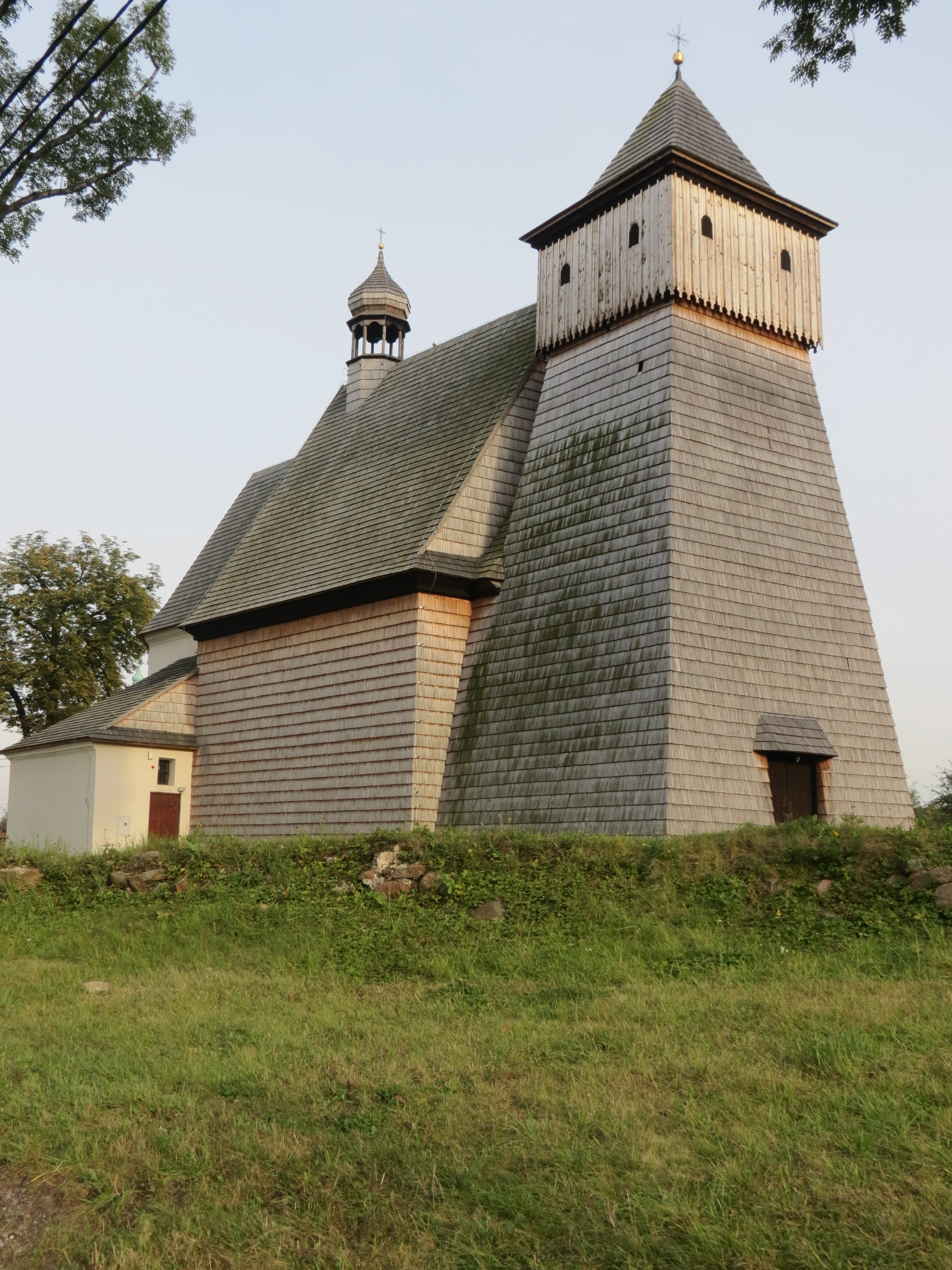 Gliwice Ostropa - kościół św. Jerzego z XVII w., drewniany (zabytek nr A/355/60)